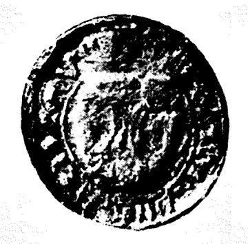 Grafika opracowana na podstawie zdjęcia pieczęci Jakusza Błociszewskiego z 1370 r. opublikowanego w: M. Haisig, Sfragistyka szlachecka doby średniowiecza w świetle archiwaliów lwowskich, Lwów 1938, s. 41-42, nr 99.